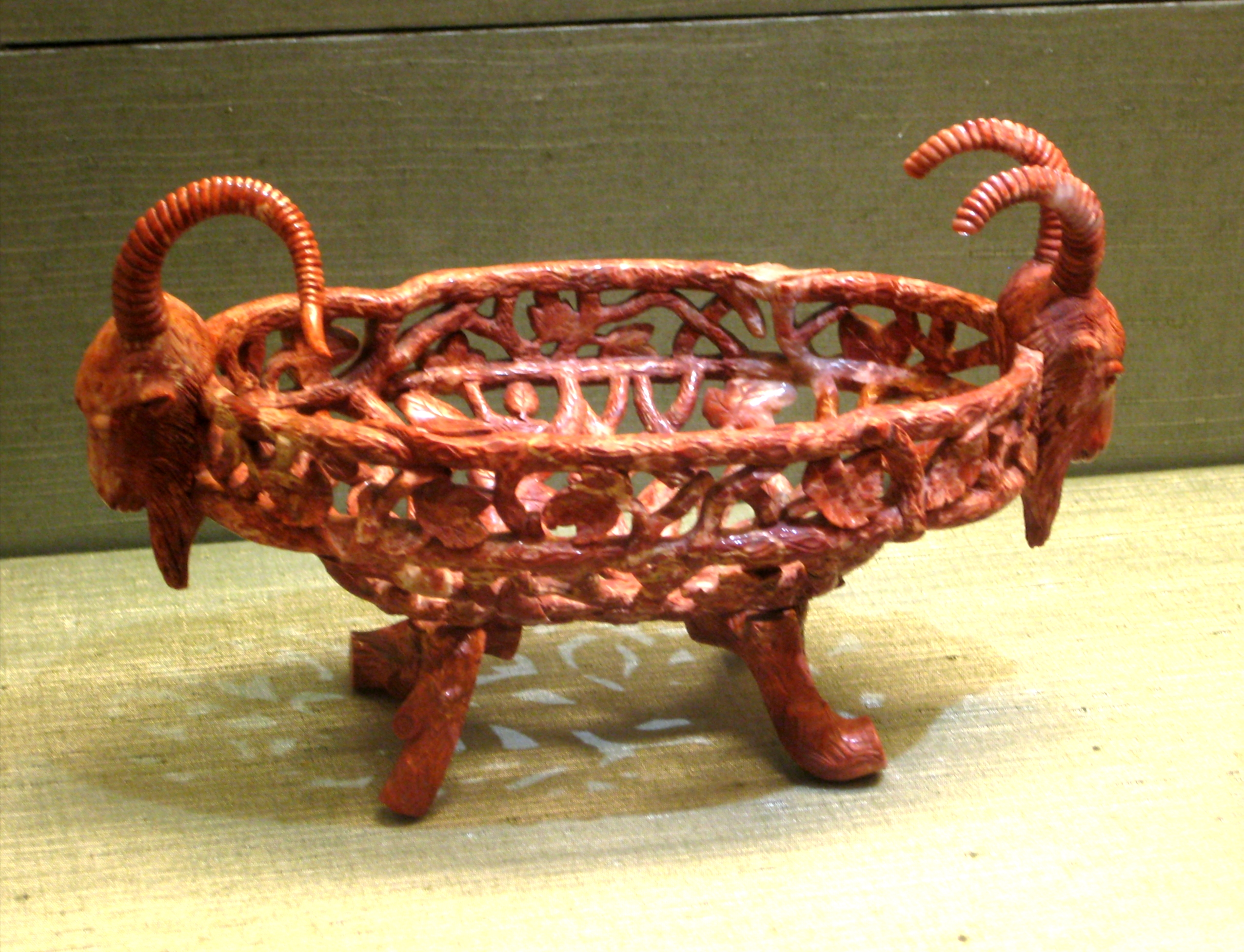 Корзиночка. Екатеринбургская гранильная фабрика. К. 19 века. Яшма. Музеи Моск. Кремля.